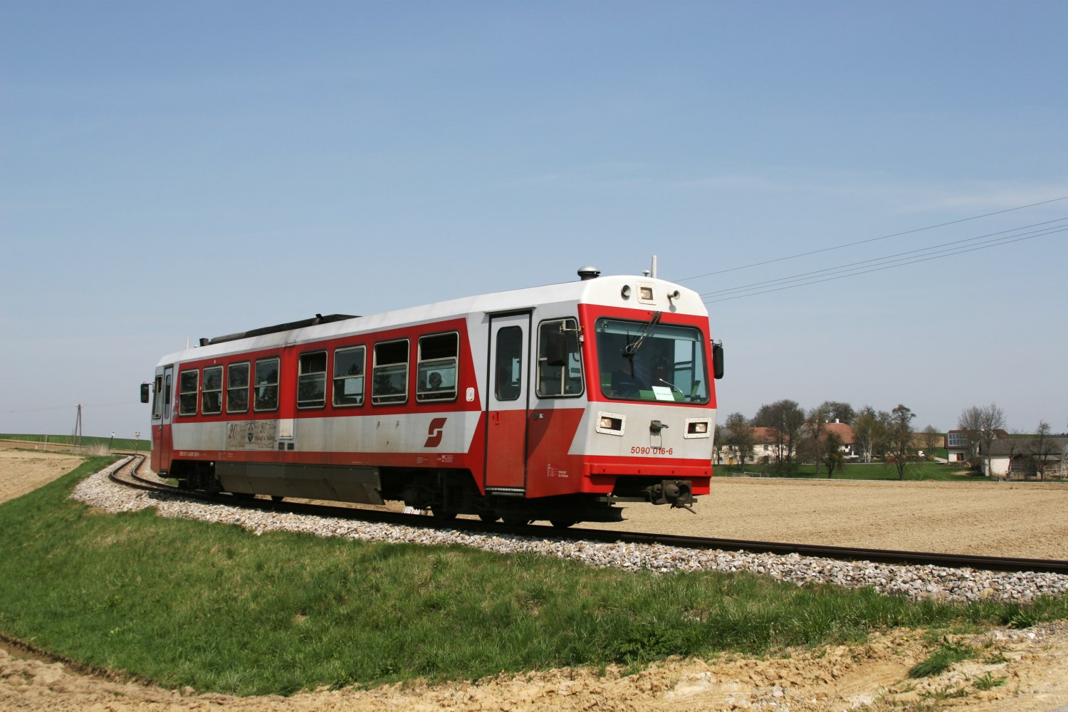 en: Narrow gauge DMU of the ÖBB near Kilb on the Ober Grafendorf - Mank branchline of the Mariazellerbahn de: Schmalspur-Dieseltriebwagen 5090 016-6 der ÖBB bei Kilb an der Lokalbahn Ober-Grafendorf - Mank, der Zweigstrecke der Mariazellerbahn.